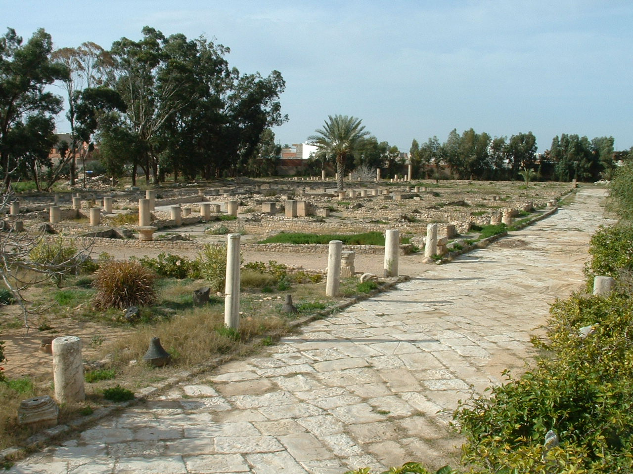 Ruines de villas romaines dans le parc du musée archéologique d'El Jem en Tunisie